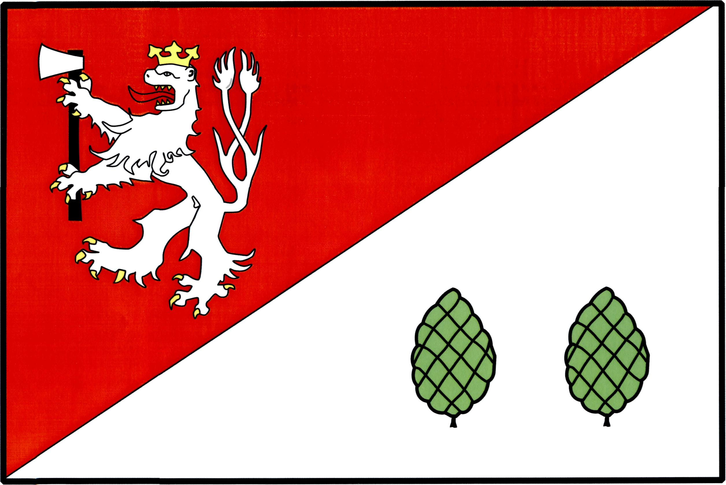 Vlajka obce Havlíčkova Borová